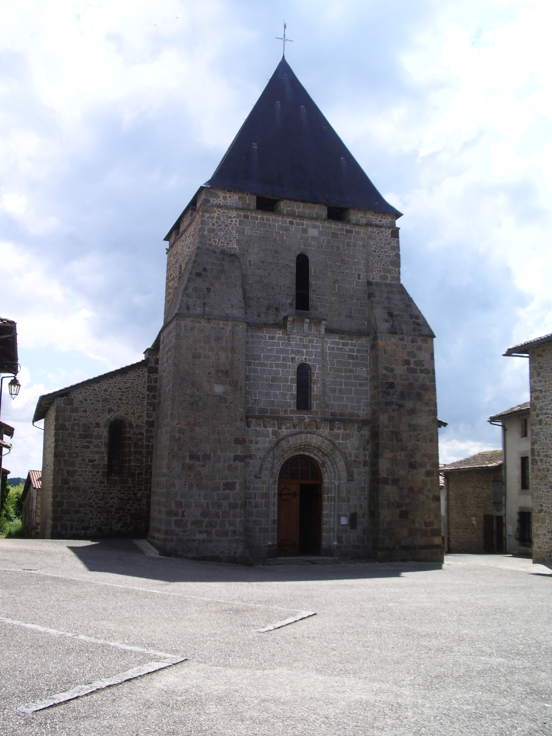 Eglise de Pressignac, Charente, France